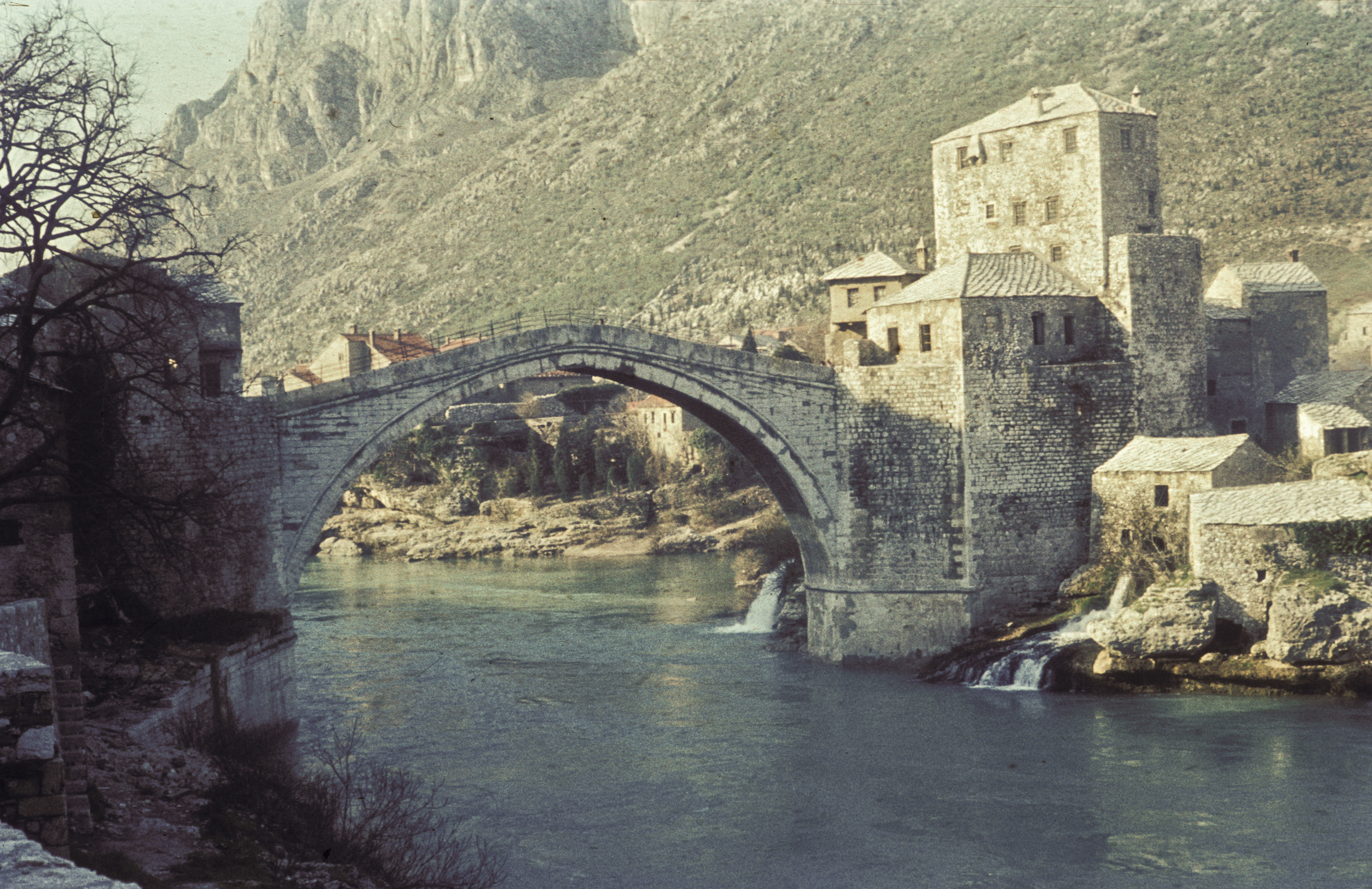 Yugoslavia (1962), Mostar